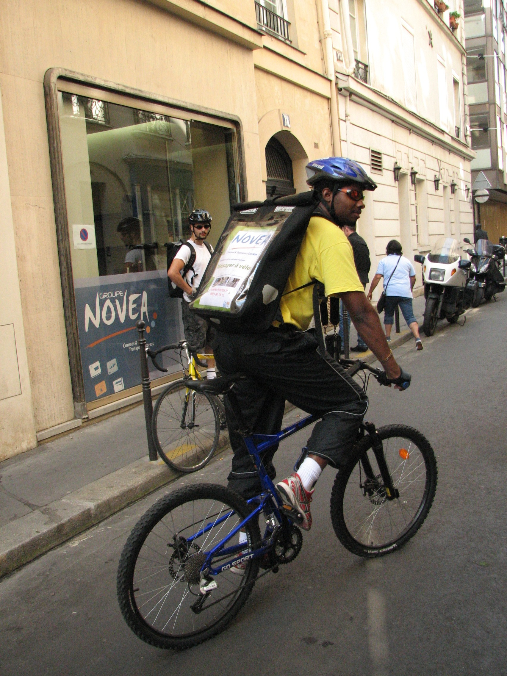 Coursier à velo